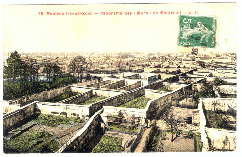 Carte postale Montreuil-sous-Bois - Panorama des "Murs" de Montreuil